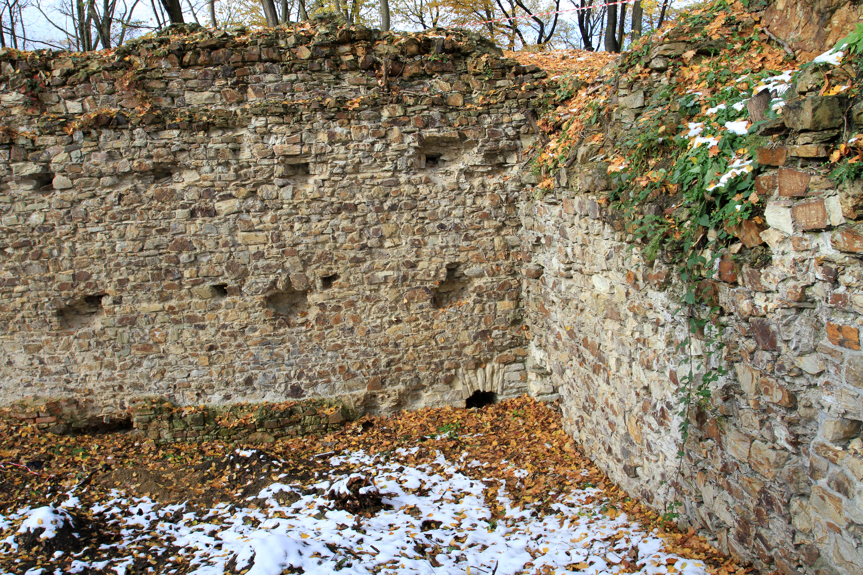 Nový hrad (Kunratice), Praha-Kunratice, na skalnatém ostrohu v Kunratickém lese